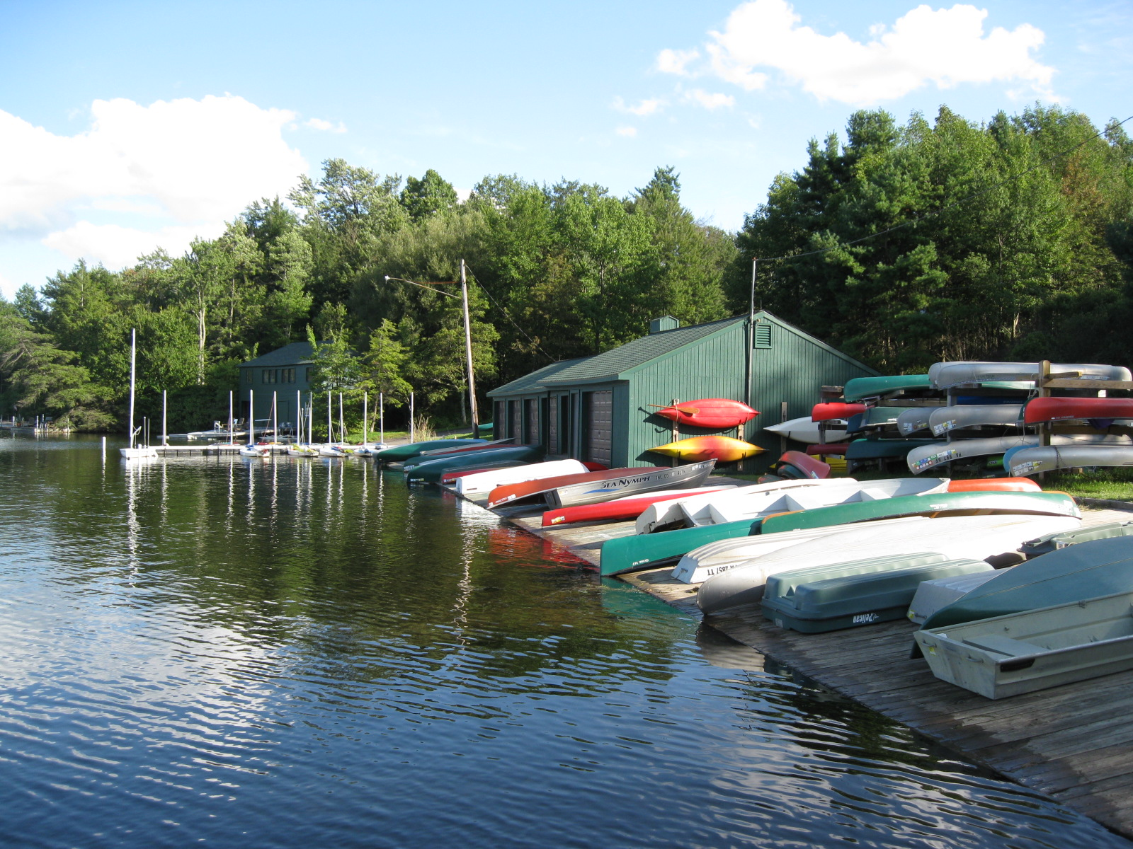 Eagles Mere, Pennsylvania